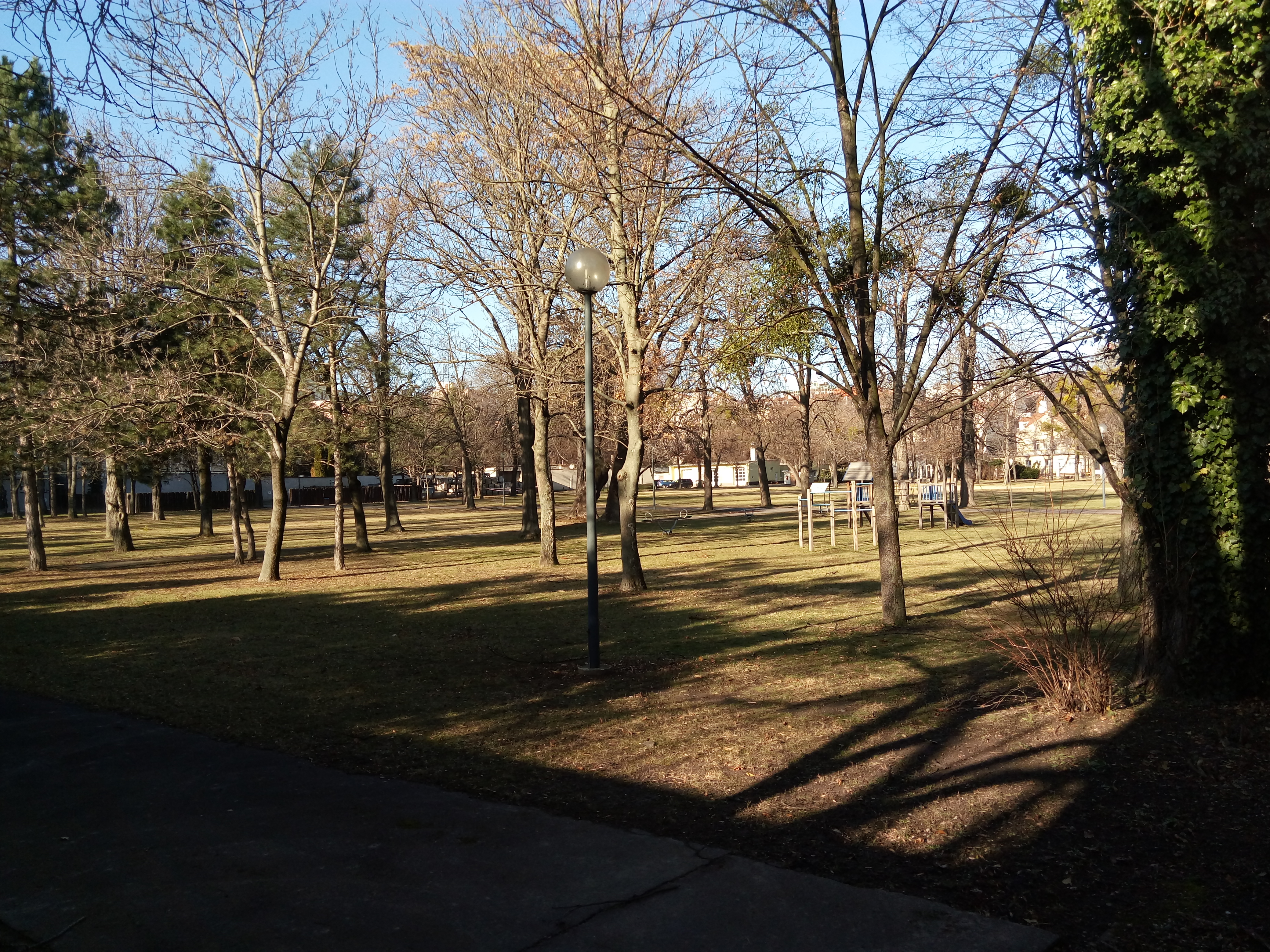 Lipaiovská záhrada, Staré Mesto, Bratislava